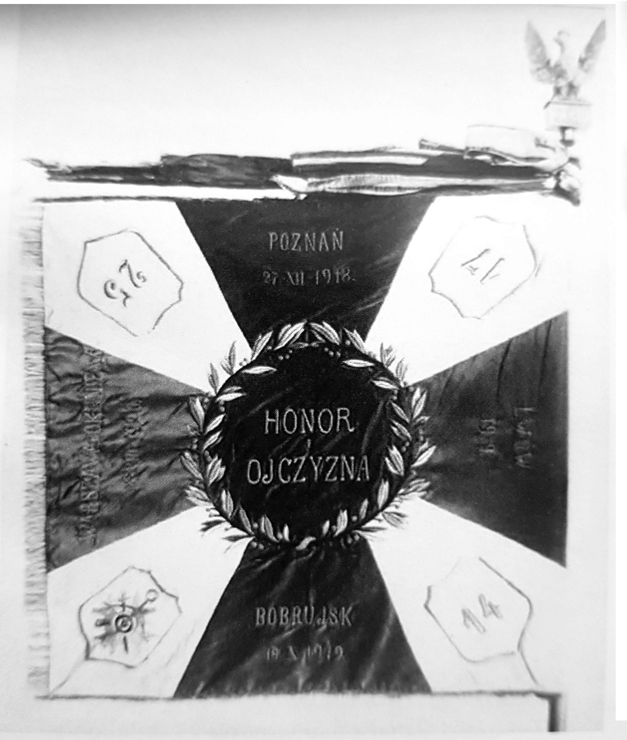 lewa strona sztandaru 7 pułku saperów